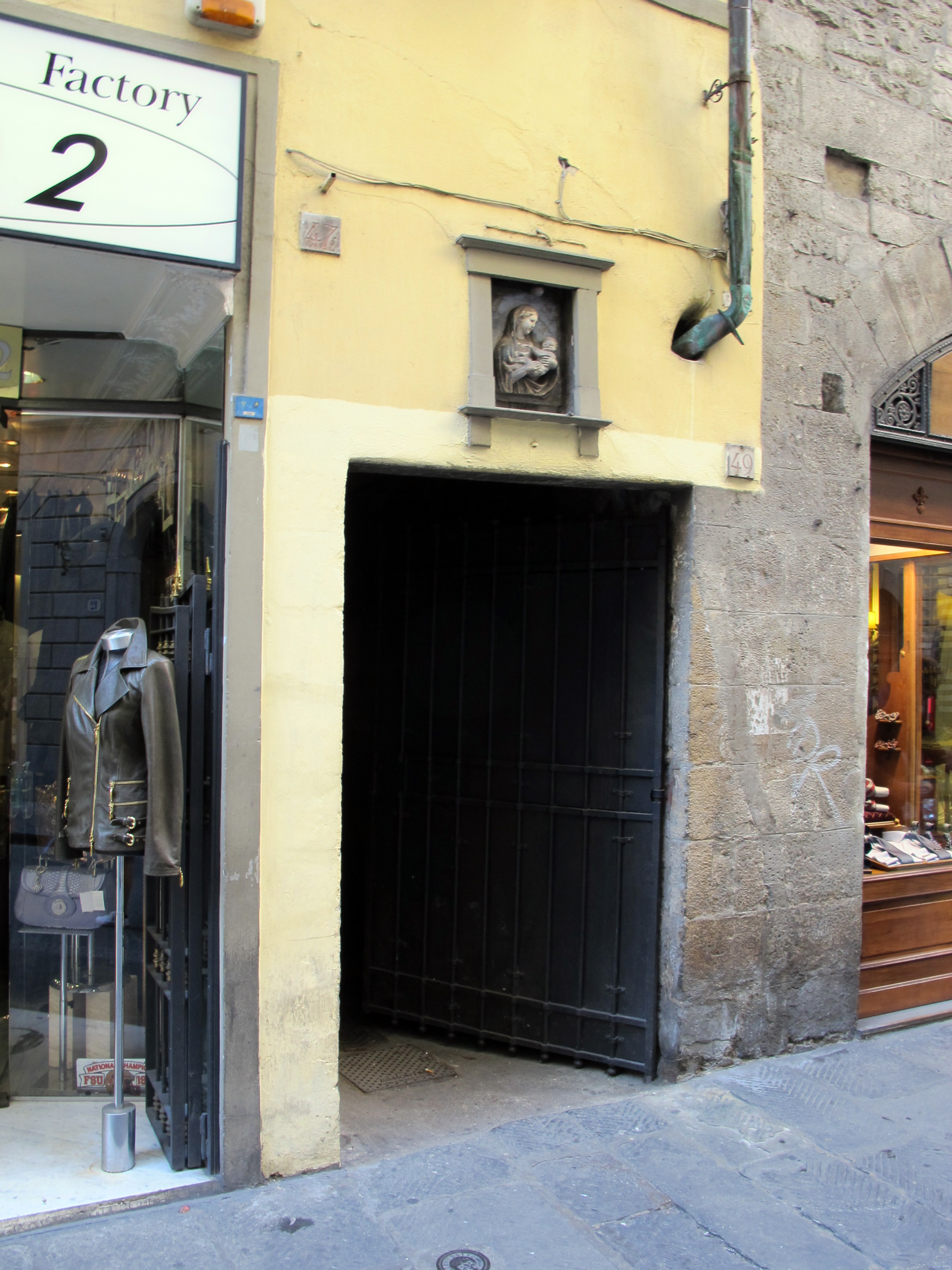 Vicolo dello scandalo, ingresso